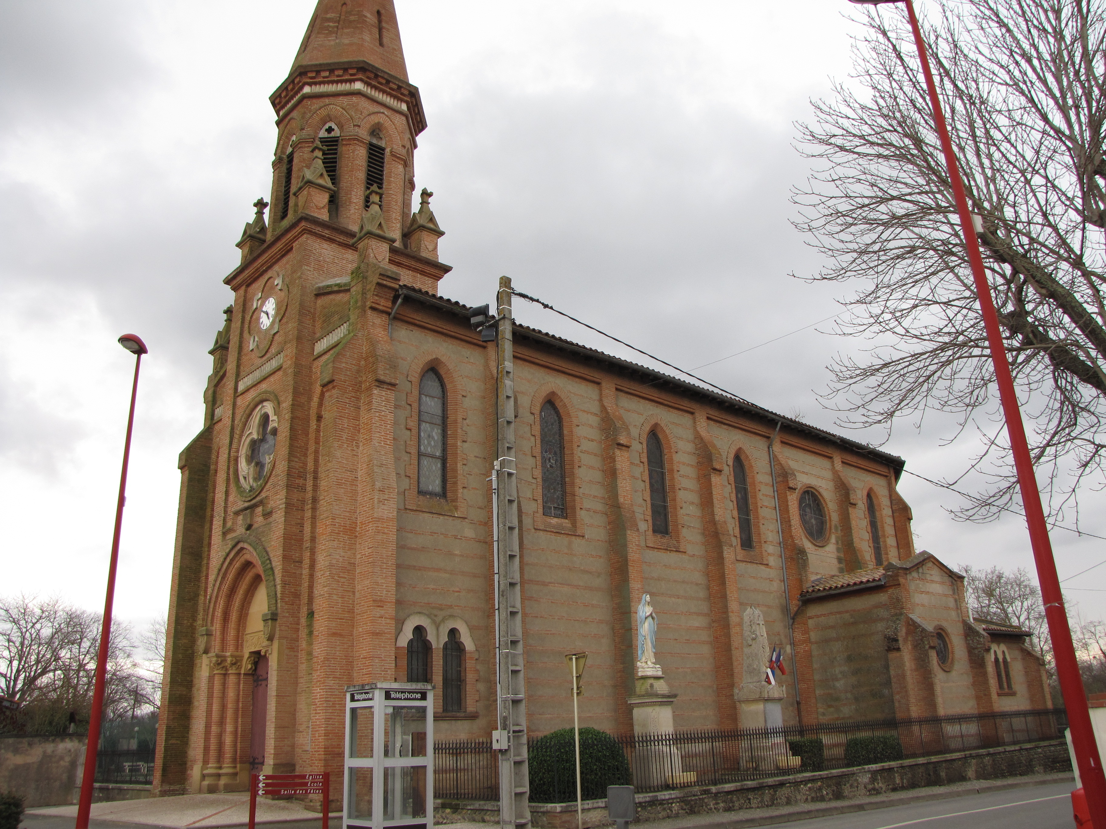 Église de Lavelanet-de-Comminges